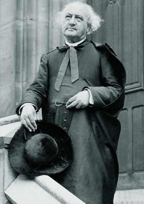 L'abbé Louis Baunard